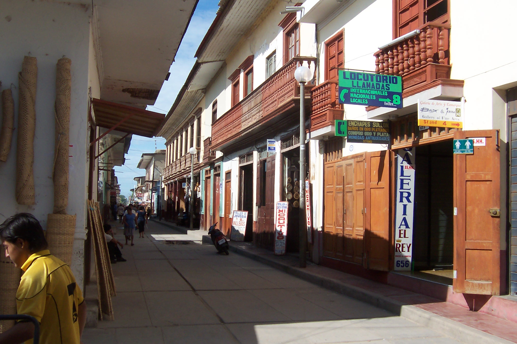 Catacaos calle principal de venta de artesanias Autor: Alfredobi Fecha: 2005